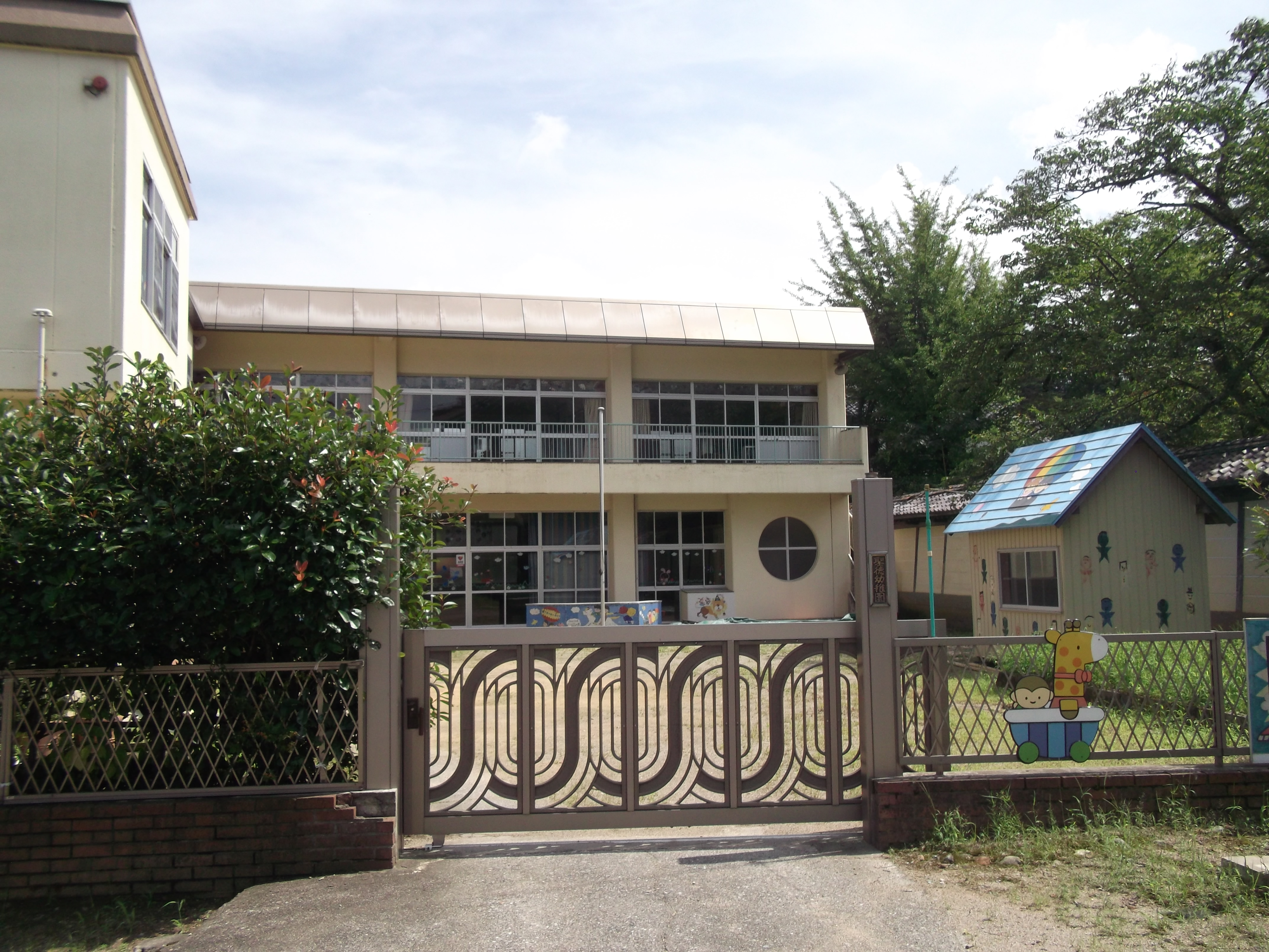 富山県南砺市井波の井波別院瑞泉寺境内の聖徳幼稚園を西側から撮影